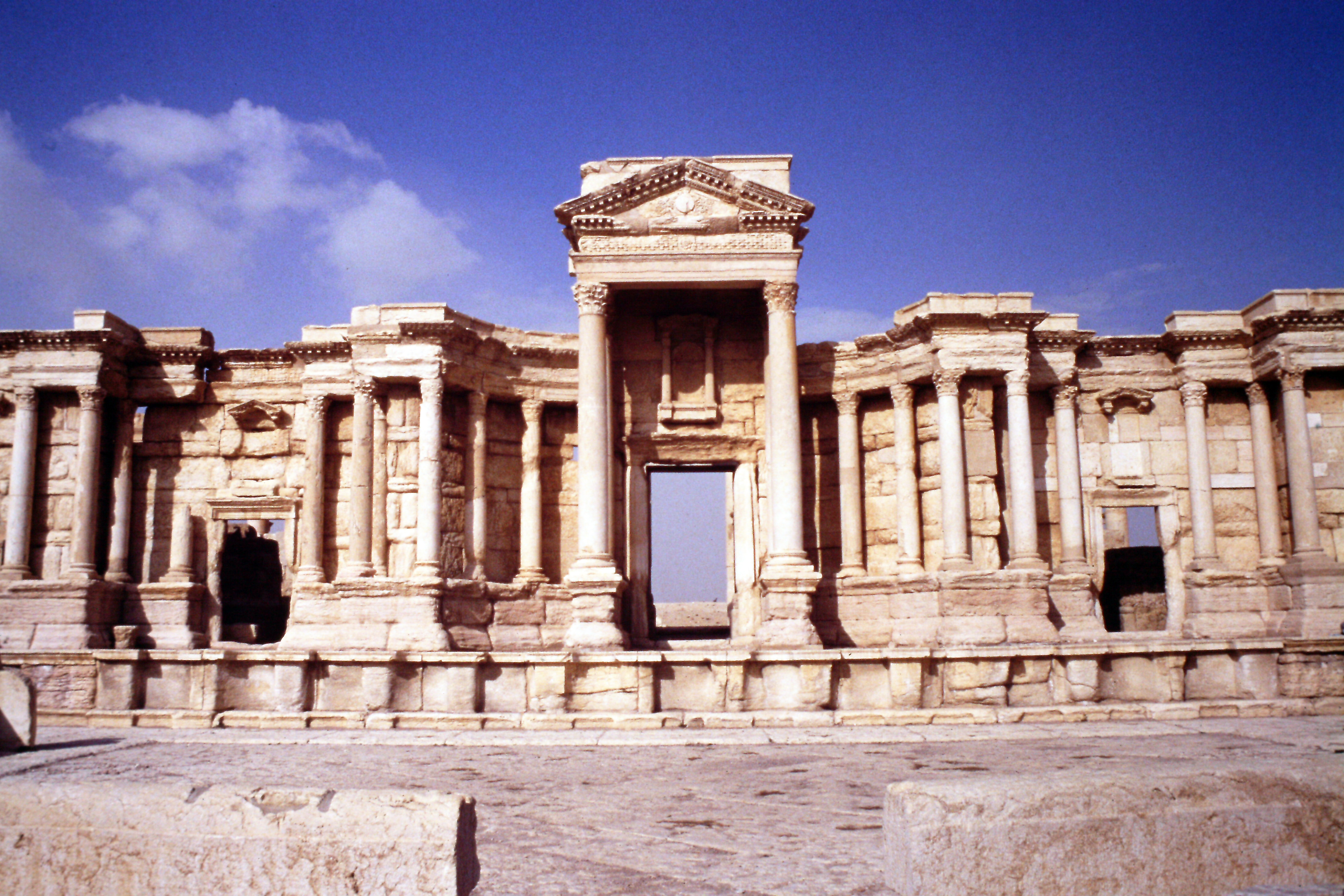 Teatro, Palmira, 1993